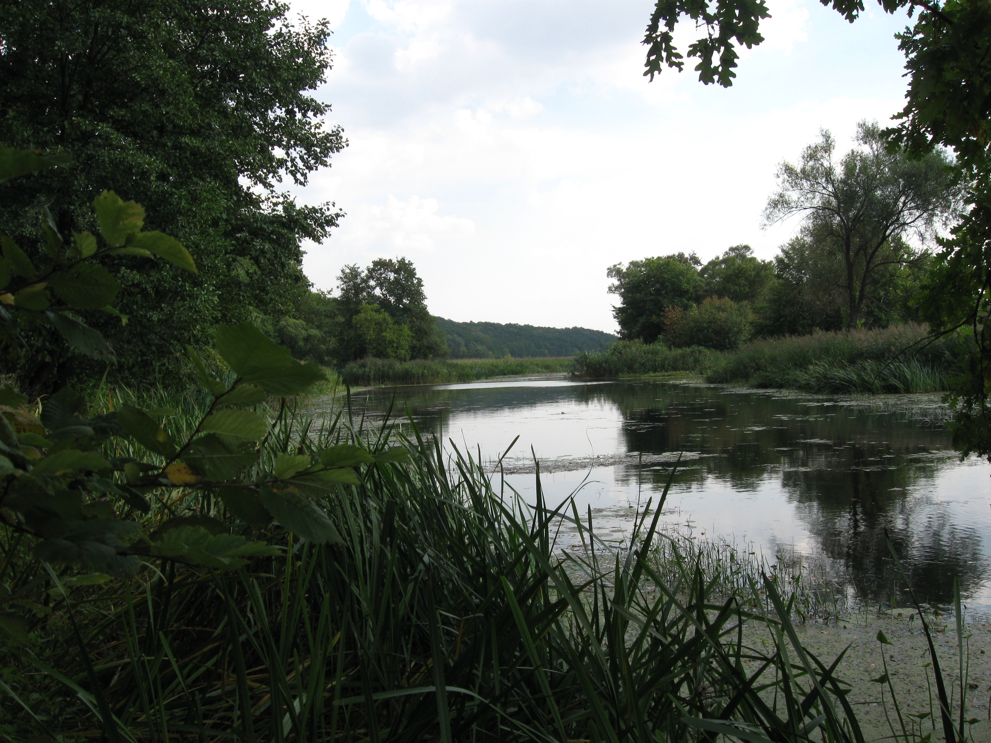 Река Ворскла в районе заповедного участка Лес на Ворскле